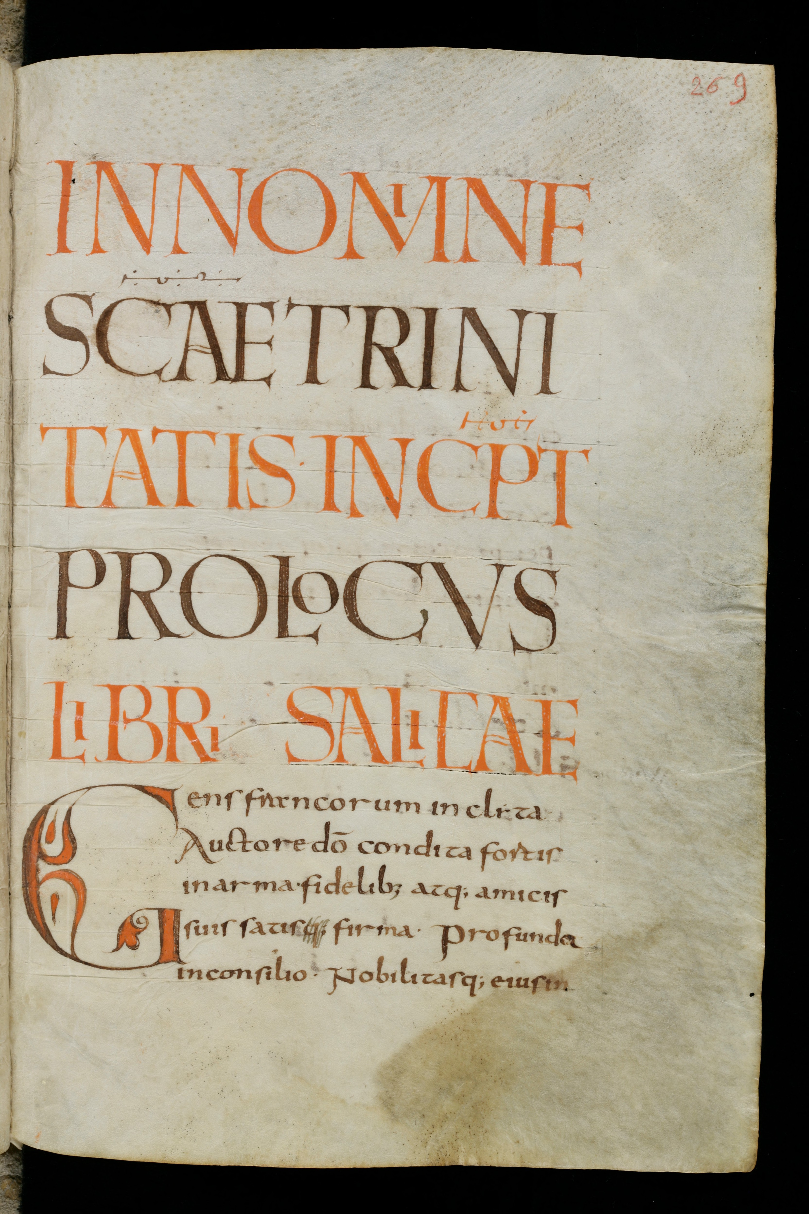 Lex Salica